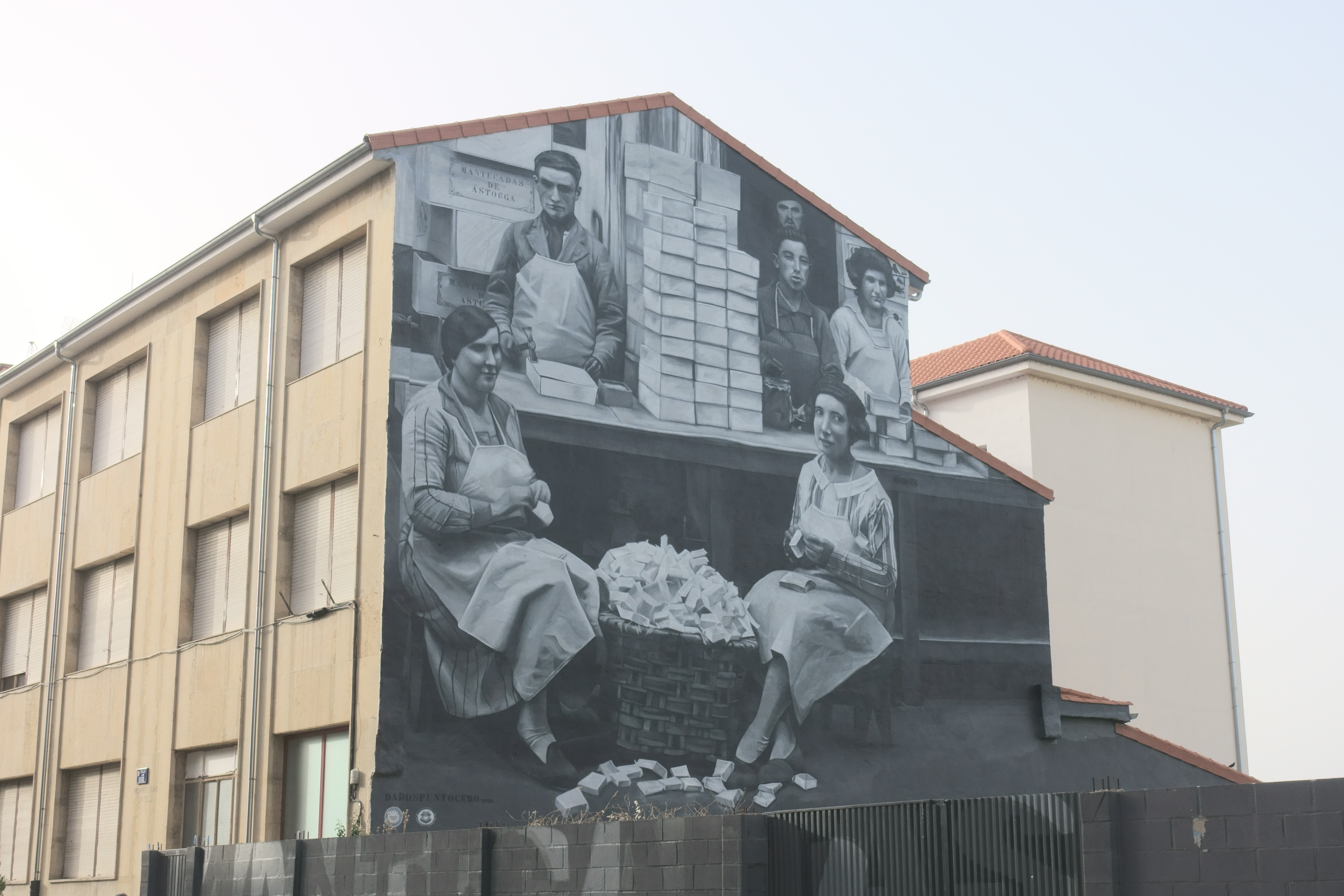 Mural dedicado a las cajilleras (mujeres que se dedicaban a hacer los envoltorios de las mantecadas) en un edificio del centro de Astorga (León, España).